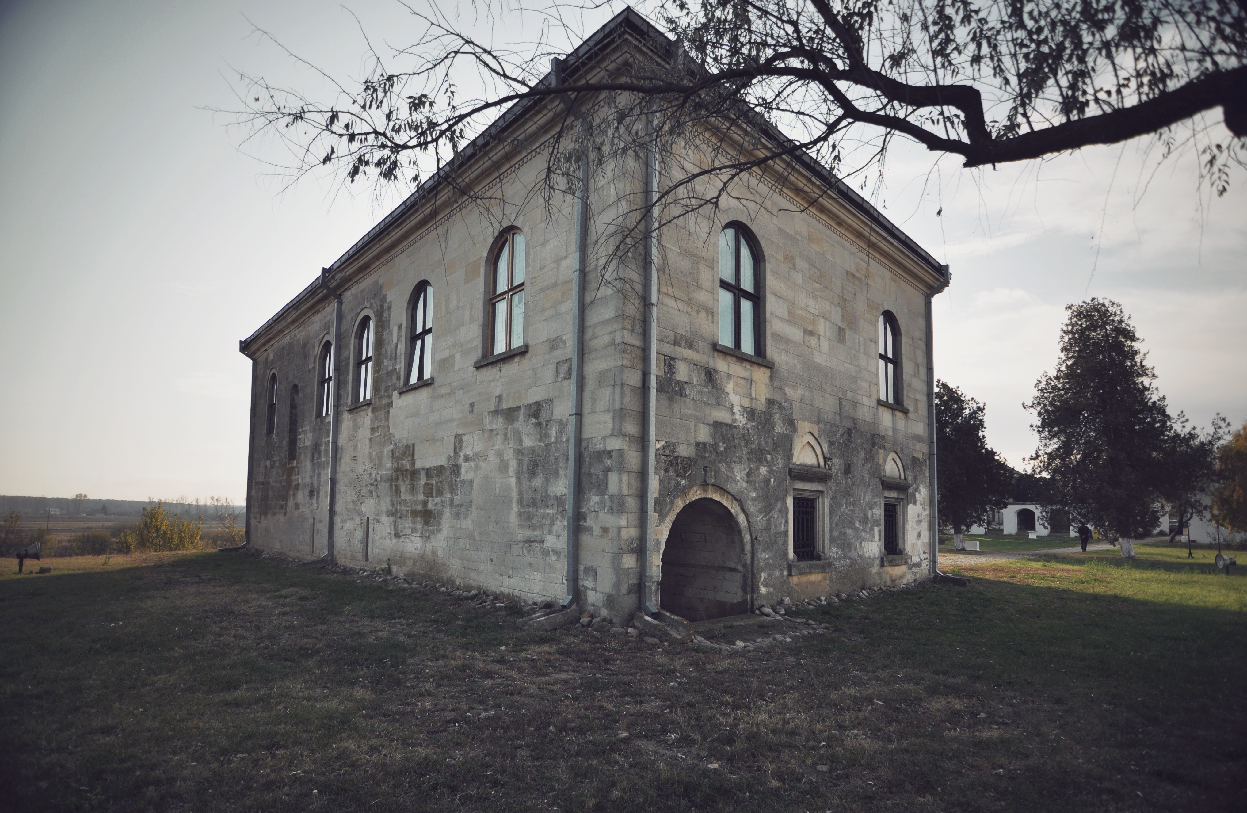 Heresti- The Stone House of Udriste Nasturel Casa de Piatră de la Hereşti a lui Udrişte Năsturel [Comuna Herăşti, judeţul Giurgiu] finished in 1642 [now belongs to The Romanian Peasant Museum and houses a permanent pottery exhibition] "singurul monument de arhitectura civila româneasca de la începutul secolului al XVII-lea construit în întregime, pe dinafara si pe dinauntru, din piatra de talie slefuita."